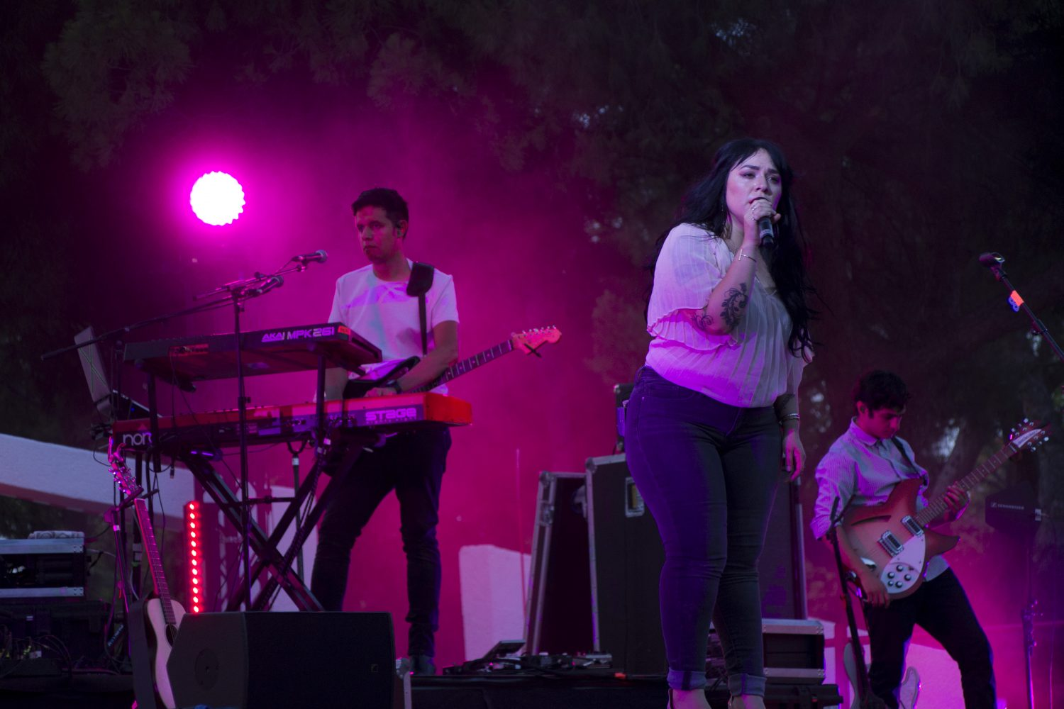 La mexicana Carla Morrison, voz emergente del pop alternativo latino, congregó ayer, domingo 9 de julio, al público madrileño en el auditorio al aire libre del Parque Forestal de Entrevías, en un concierto que reveló una artista singular en la escena del pop internacional, llena de personalidad y carisma.